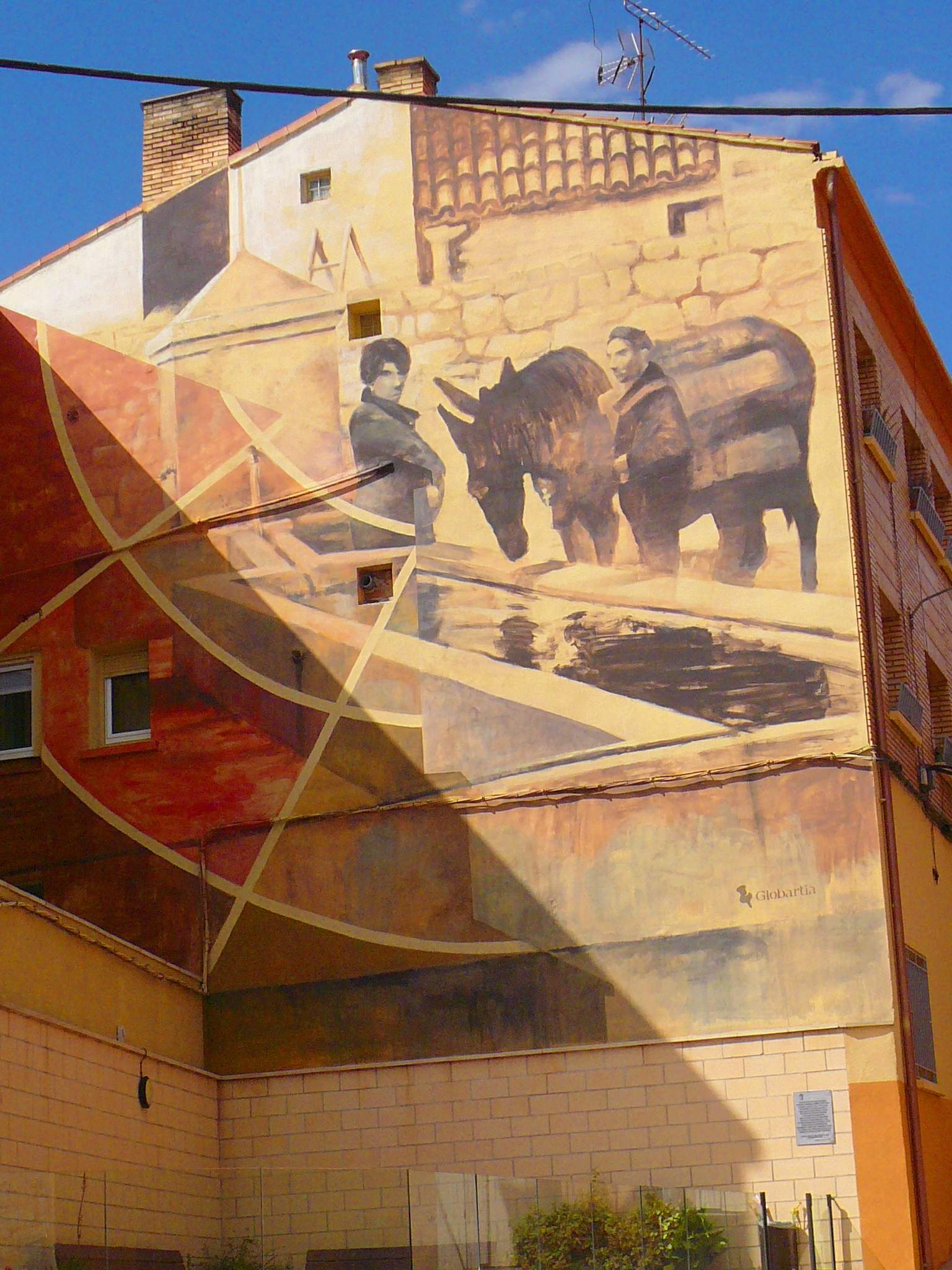 Mural en Pradejón (La Rioja)